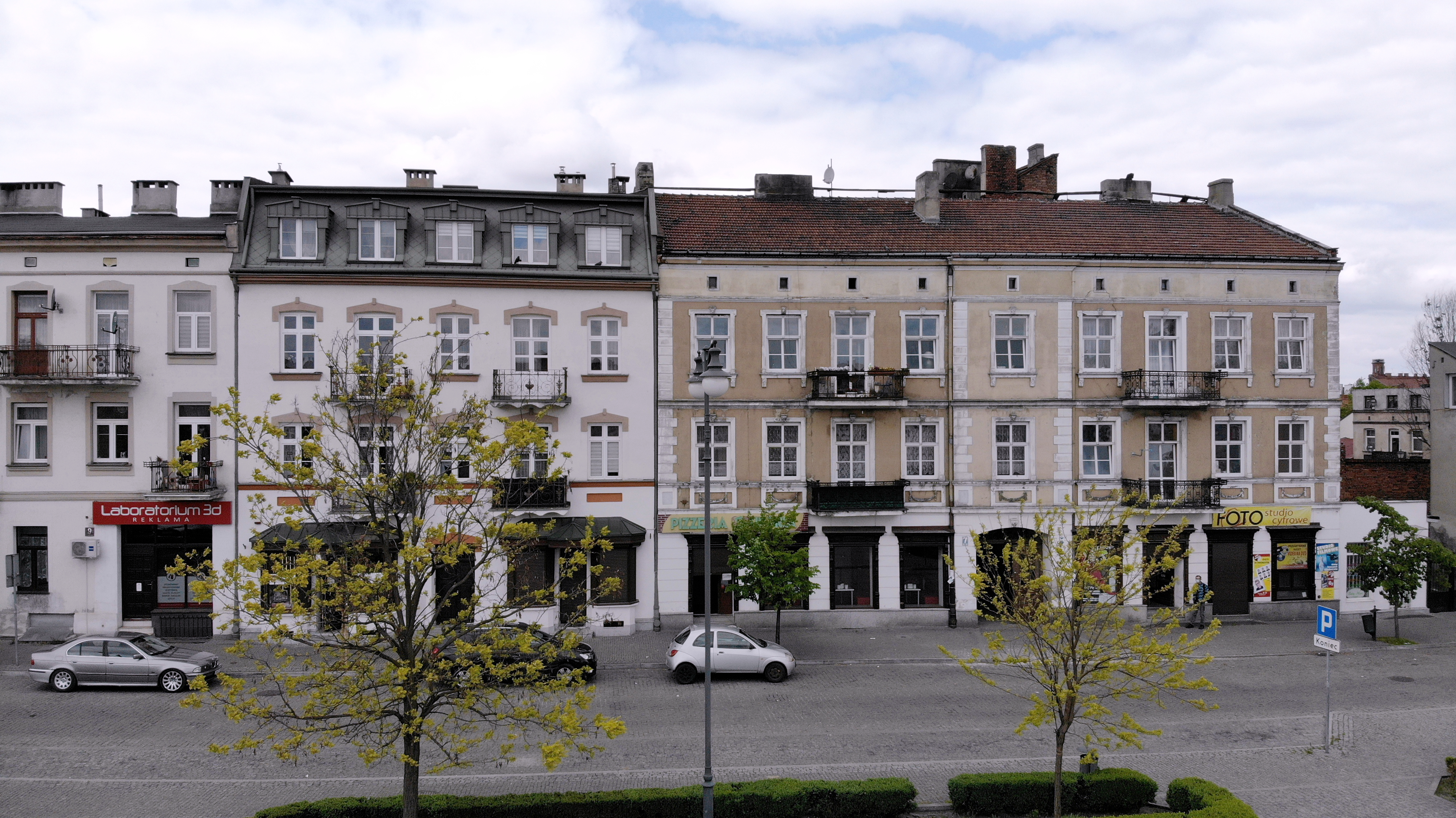 Zielony Rynek (2020 r.)